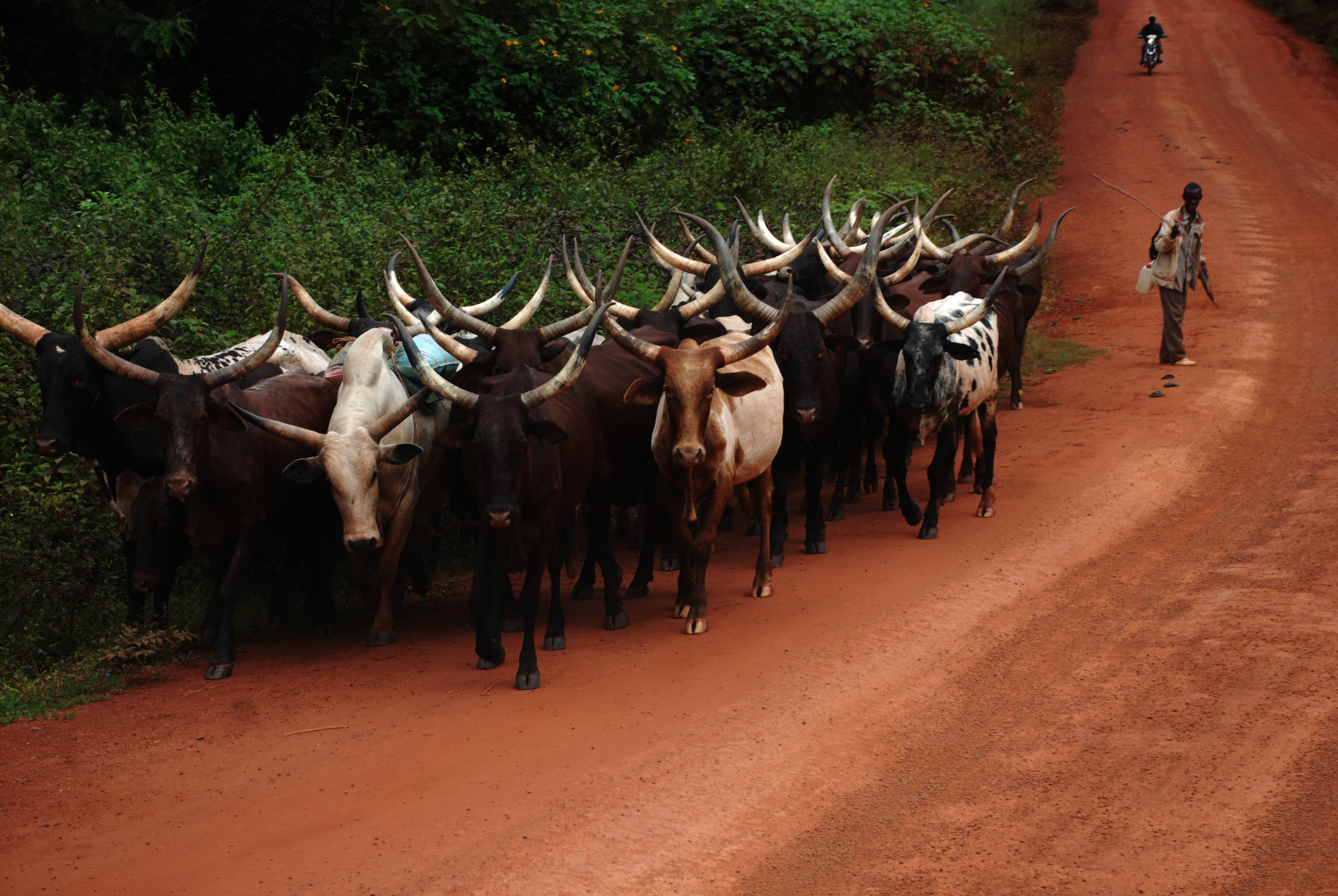 Une caravane de Boeufs sur une route non bitumée dans la localité de Yokadouma dans la région de l'Est du Cameroun